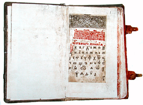 Первый московский печатный букварь Василия Бурцова 1634 года